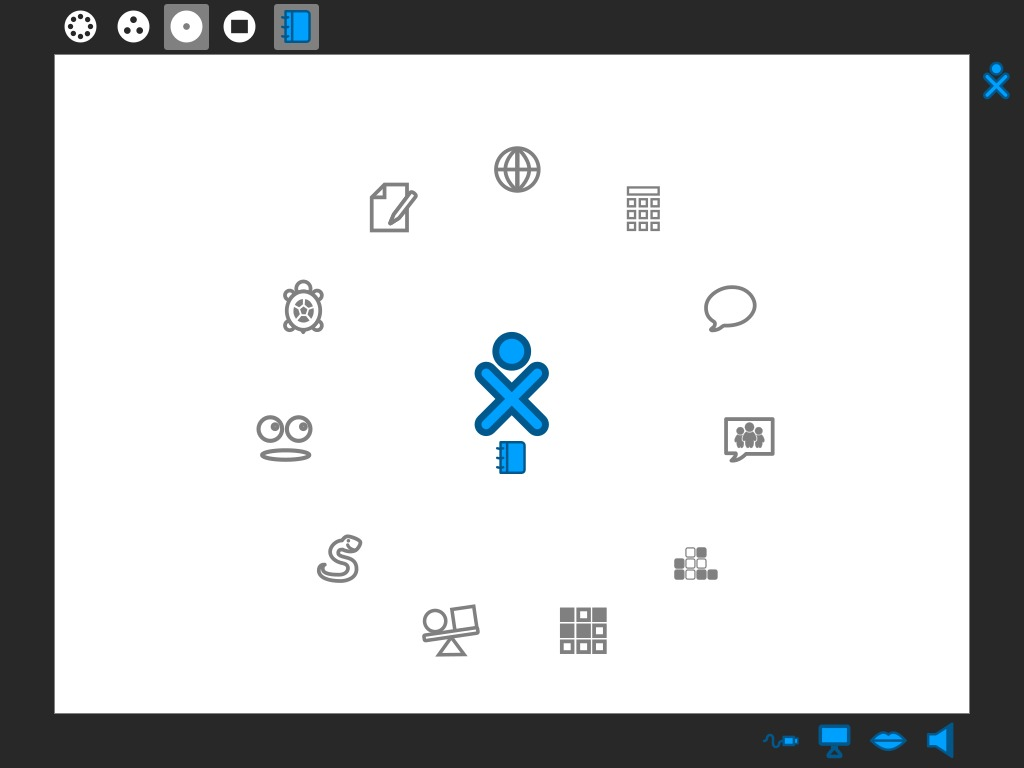 Esta imagen muestra el escritorio de Trisquel GNU+Linux 8.0 en la version Sugar TOAST.